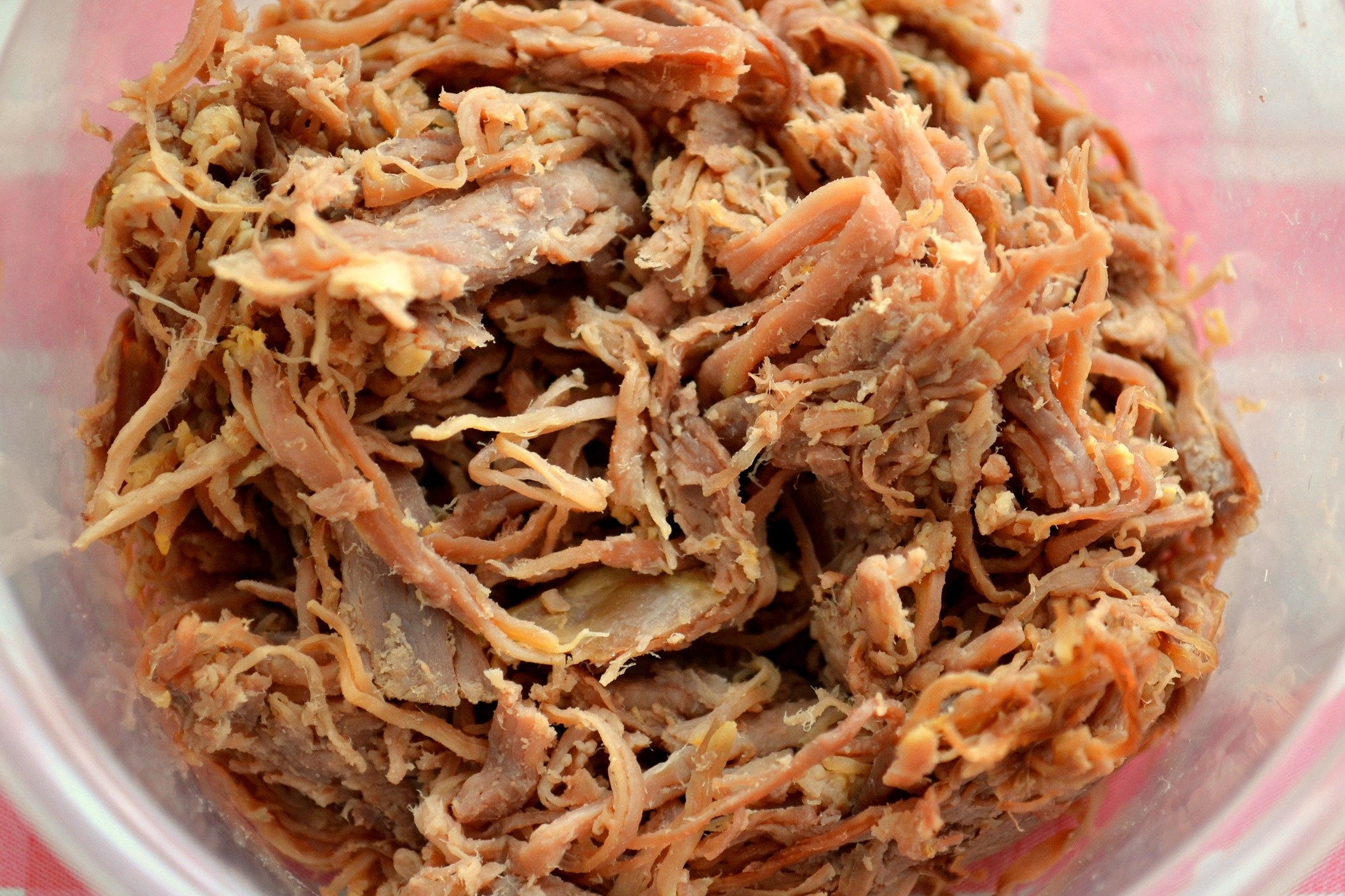 Shredded beef